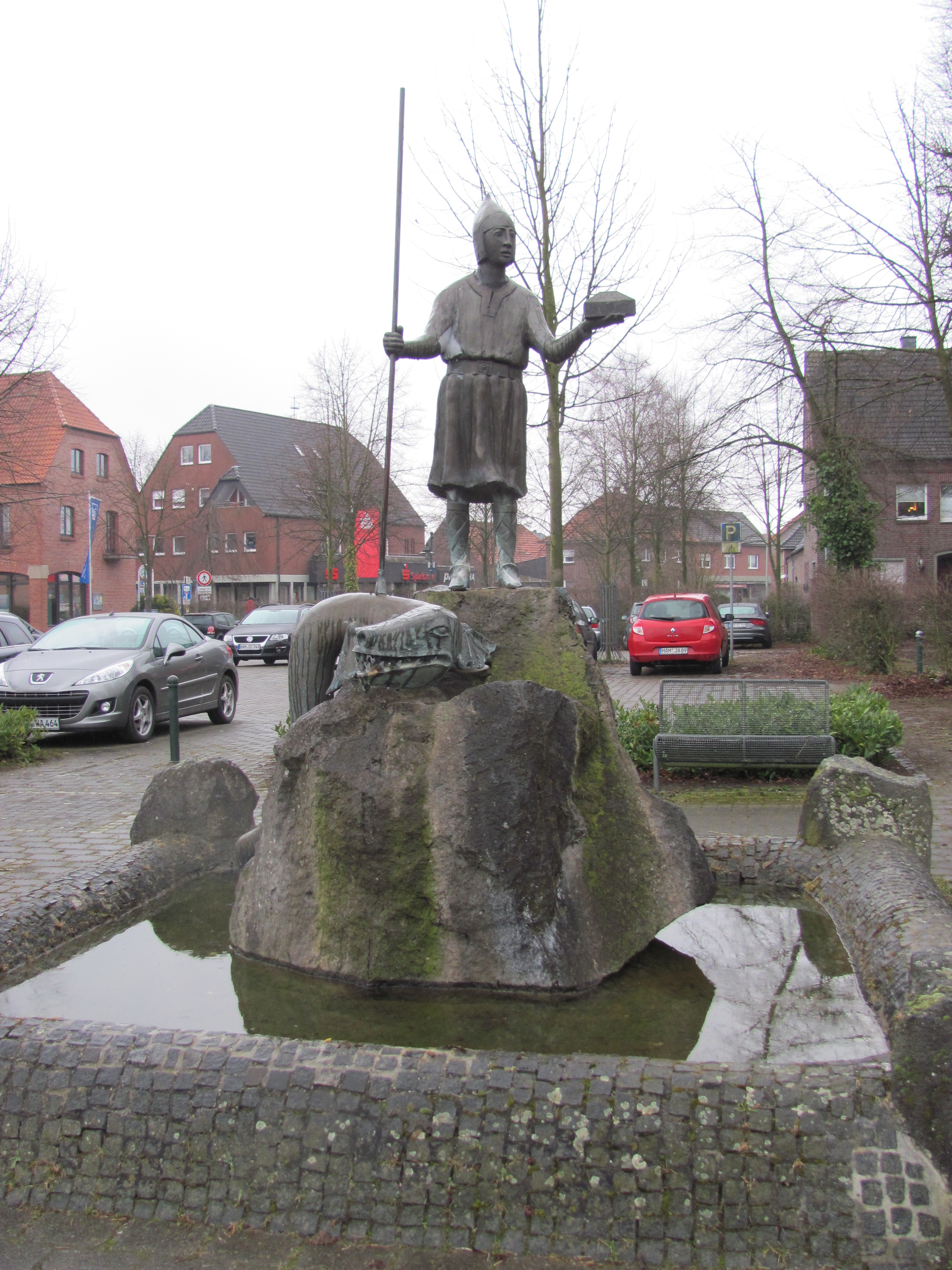 Dorfbrunnen in Dolberg (Stadt Ahlen) mit der Ritterfigur des Edelherrn Richert von Thuleberh als Drachentöter